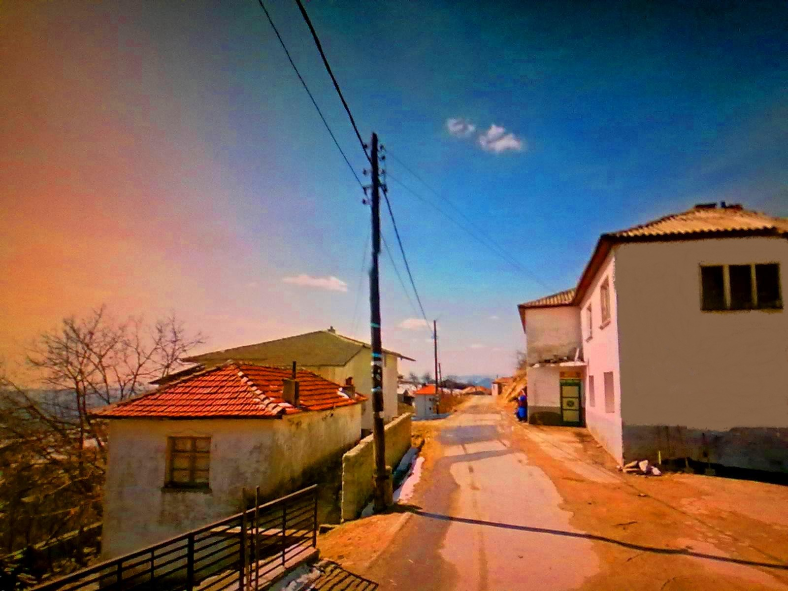 Махала Юрунце,Гърнати